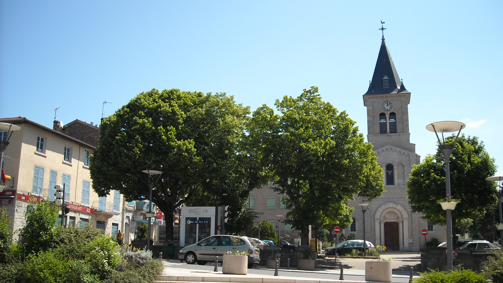 Eglise Saint Martin sur la place Décurel avant rénovation de cette derniere en 2012